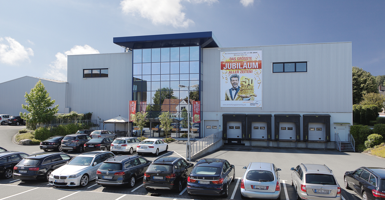 Ausstellungszentrum in Bielefeld 2015